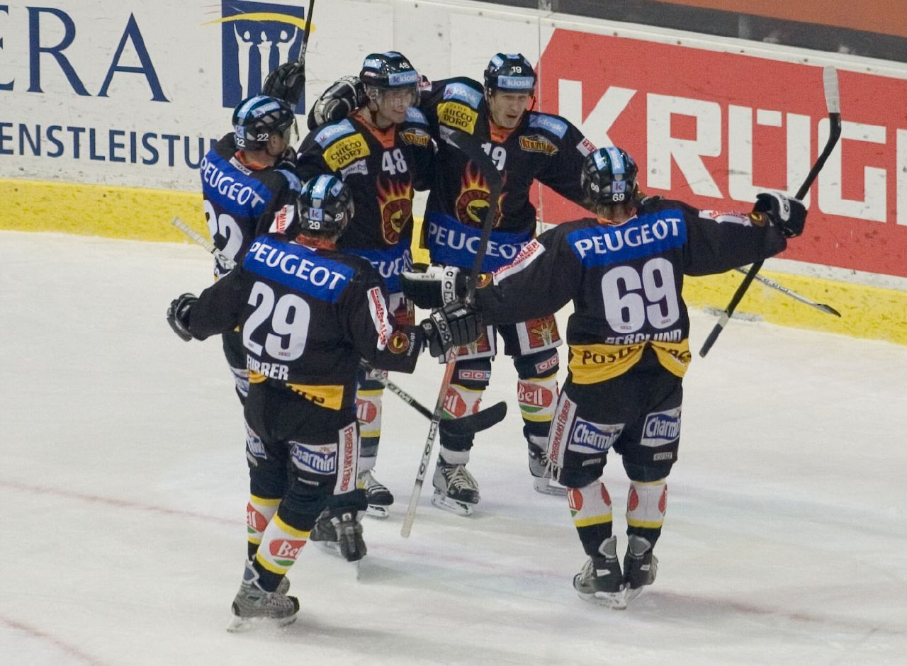 Torjubel (SC Bern gegen Fribourg-Gottéron)